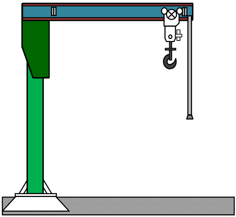 Колонный свободностоящий консольный кран - мой чертёж